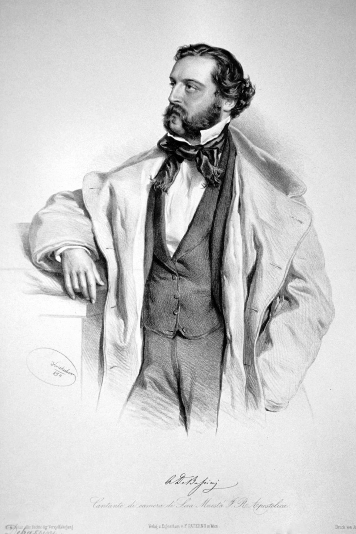 Achille De Bassini (1818-1881), italienischer Sänger (Bariton) Lithographie von Josef Kriehuber, 1854